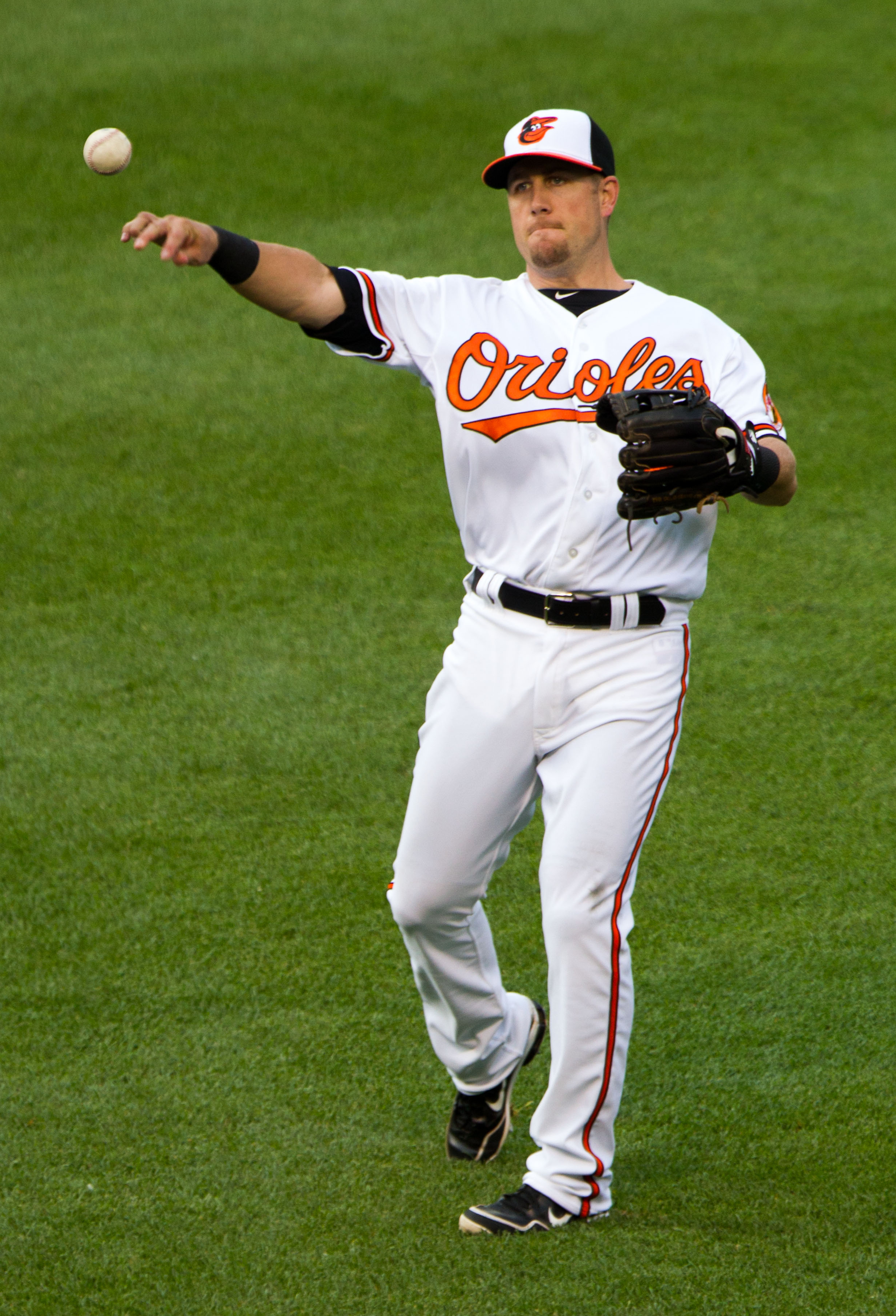 Steve Tolleson